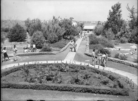 אושה - מראה נוף בקבוצה.